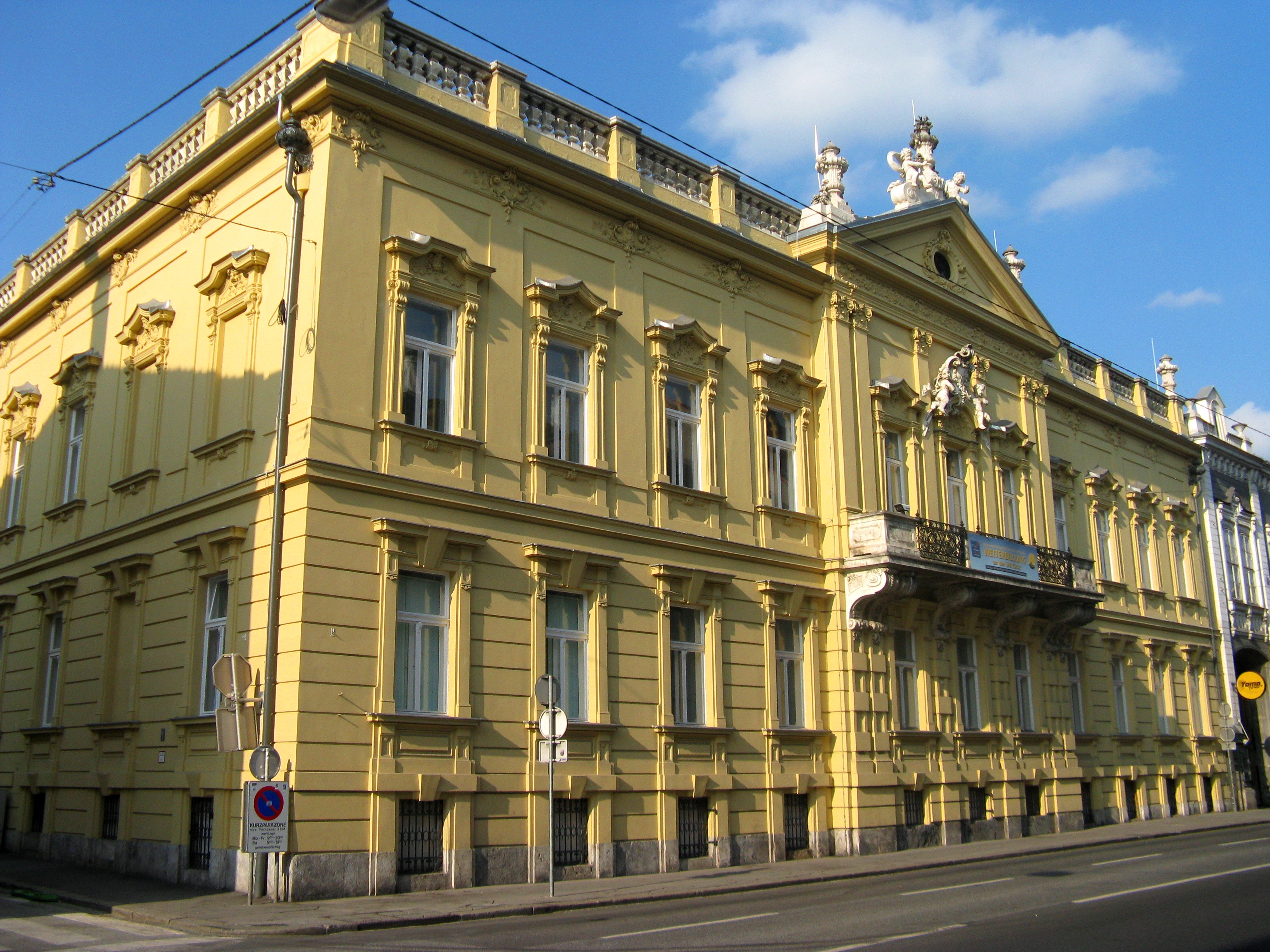 Ehem. Stadtpalais Kottulinsky, Graz